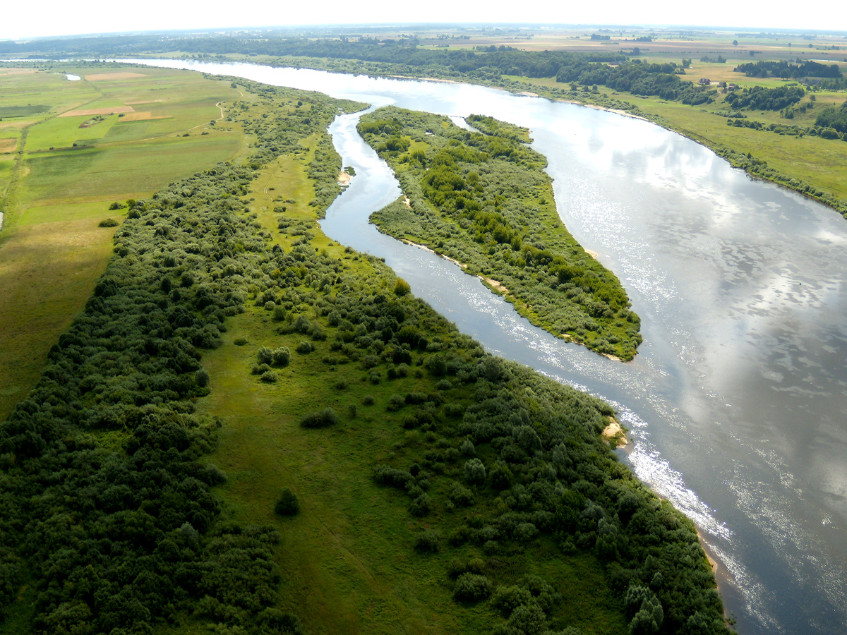 Nemunas prie Molynės,Jurbarko raj.